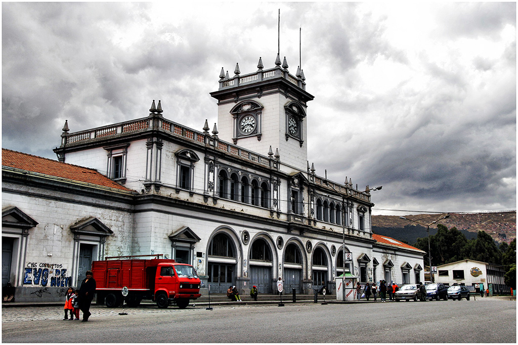 Julio Mariaca Pardo, arquitecto boliviano, en 1930, la construyó en seis hectáreas de terreno. Declarado Patrimonio Histórico Cultural en 1999, bajo Ordenanza Municipal 076/99 HAM-HCM 074/99.